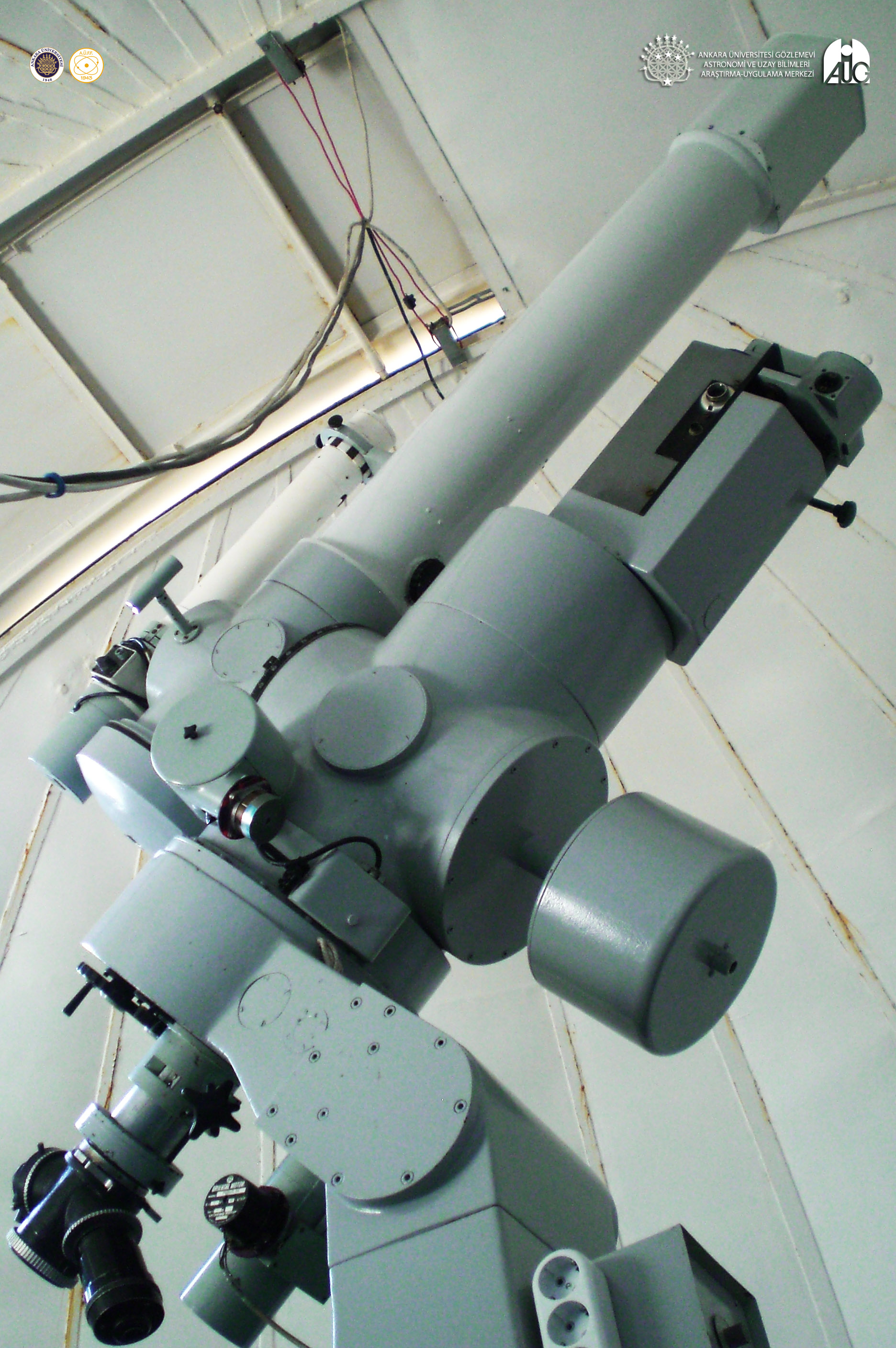 Ankara Üniversitesi Gözlemevi Coude Teleskobu